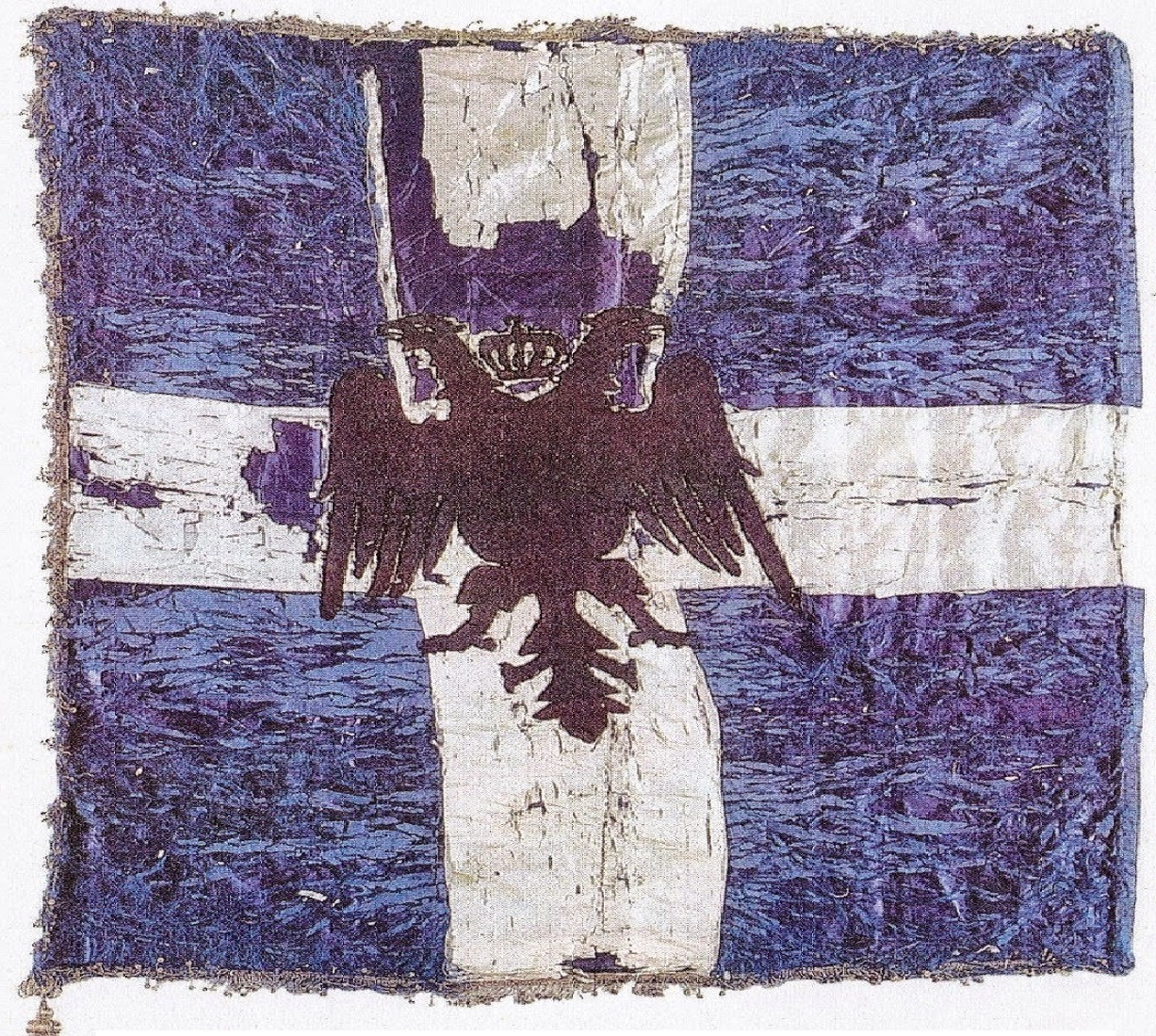 Northern Epirus Flag raised in Korytsa/Korca, Northern Epirus (modern southeast Albania), during the revolt of Korytsa (March 22, 1914 [O.S.]